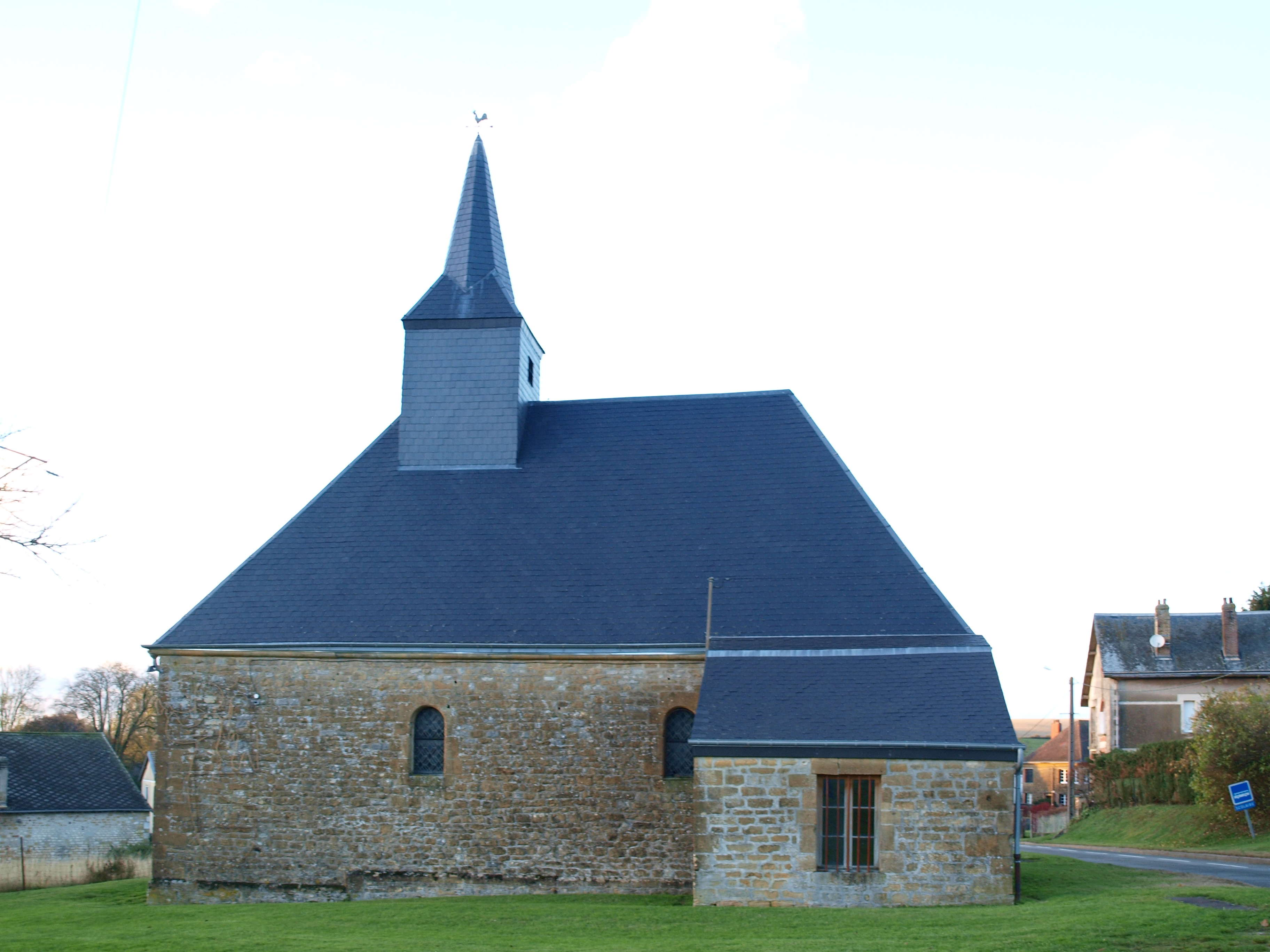 Les Petites-Armoises (Ardennes, France) ; église.